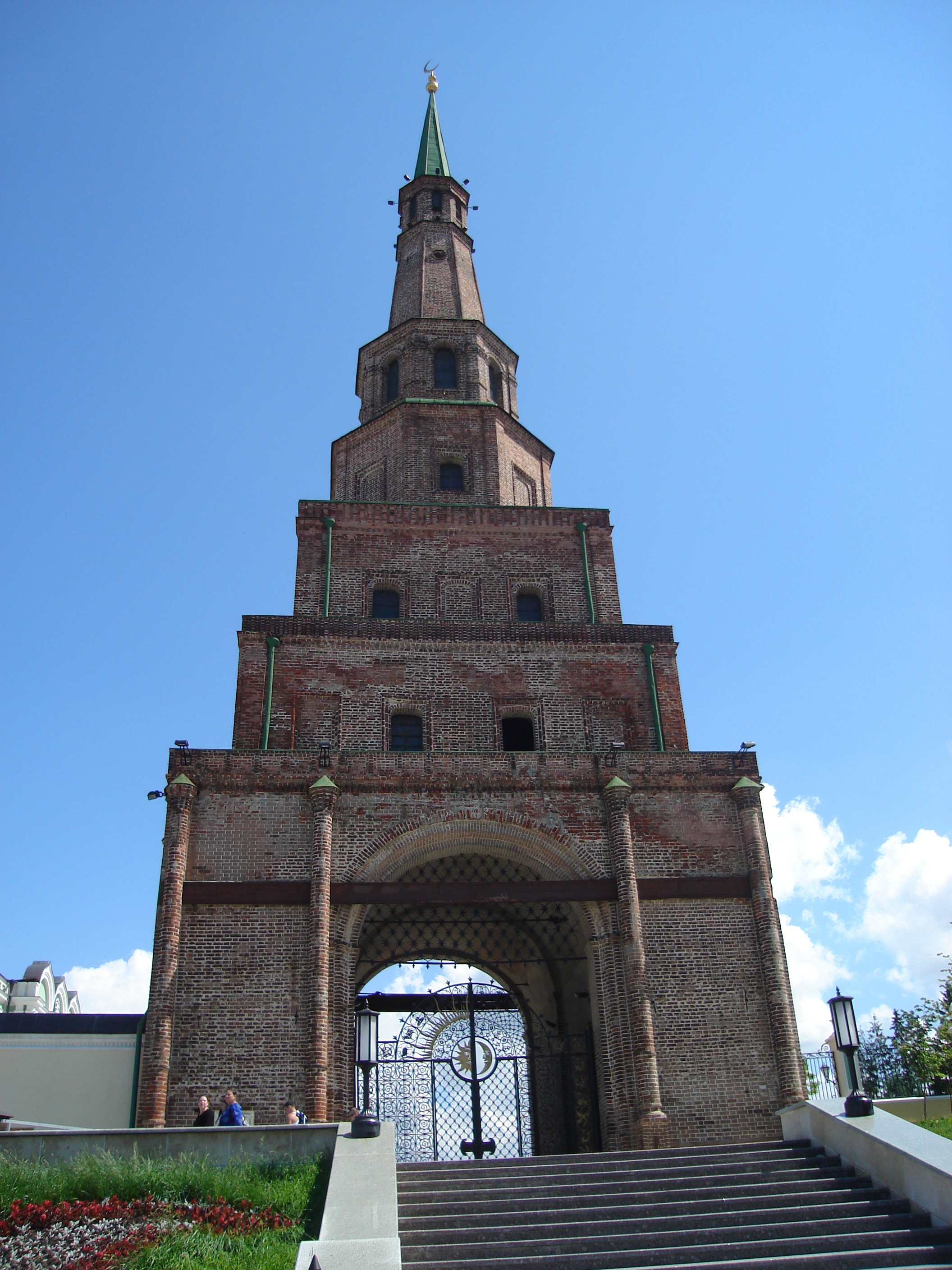 Söyembikä Tower